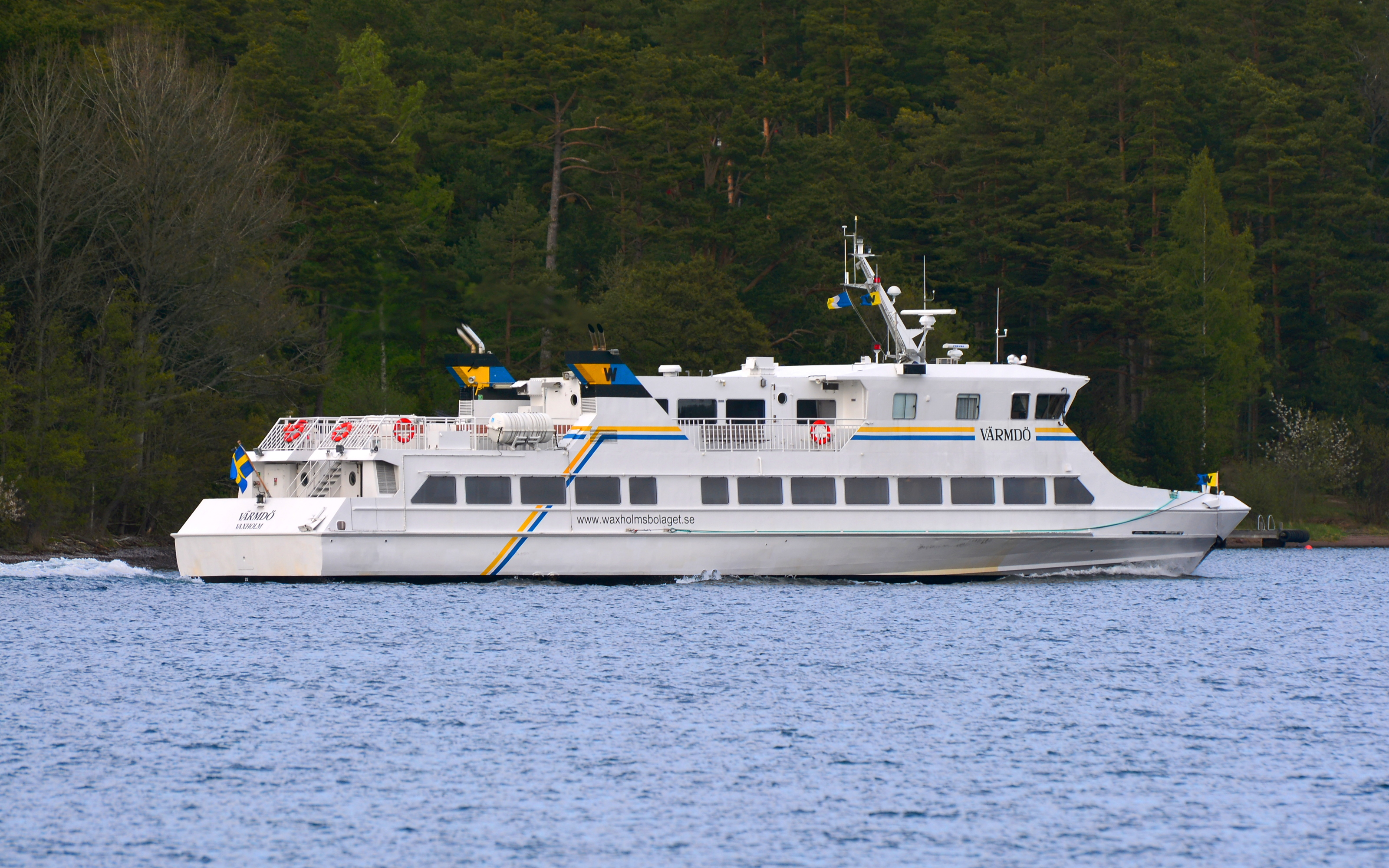 Waxholmsbolagets fartyg M/S Värmdö